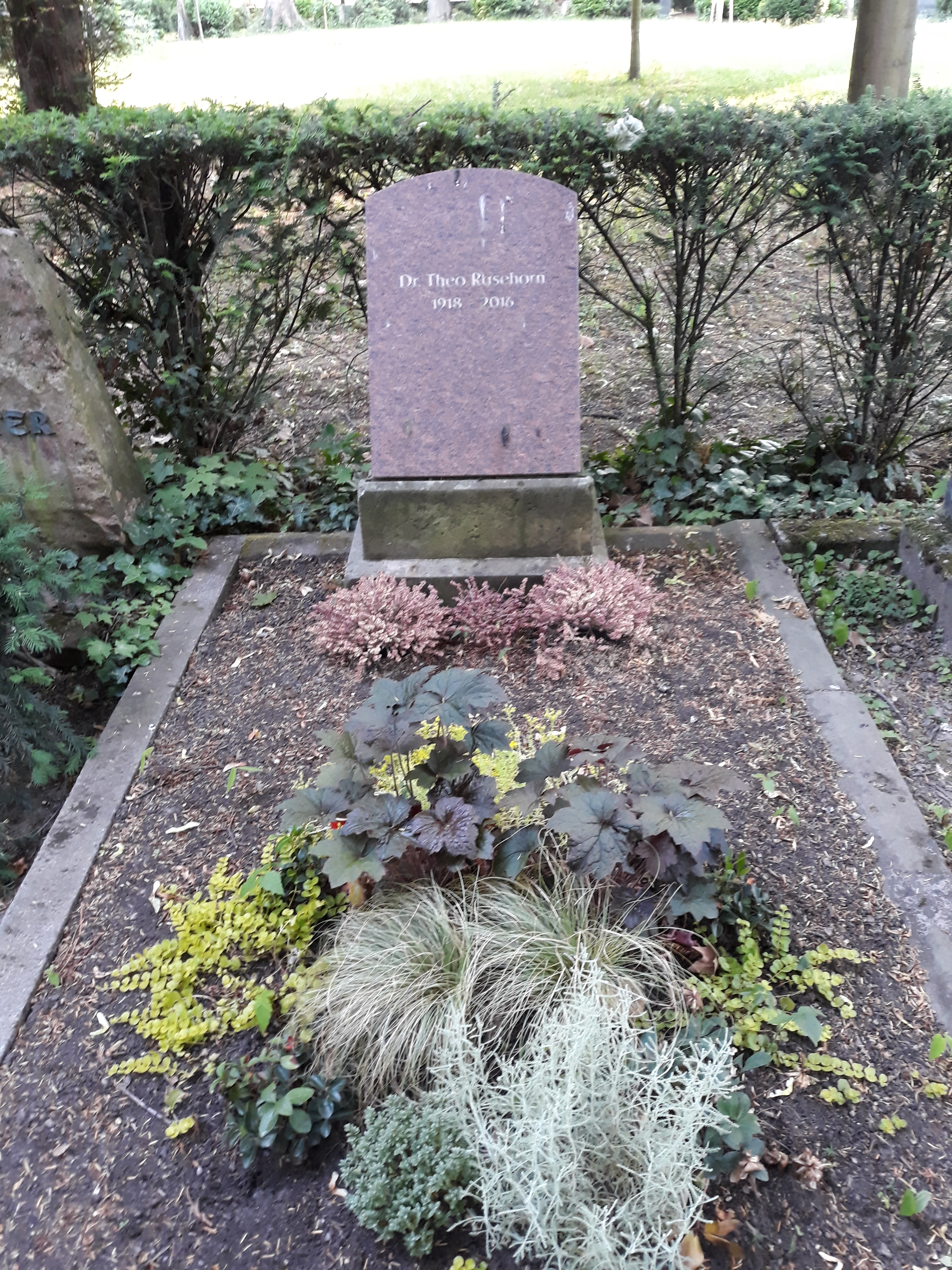 Das Grab des deutschen Juristen Theo Rasehorn auf dem Alten Friedhof Bonn.